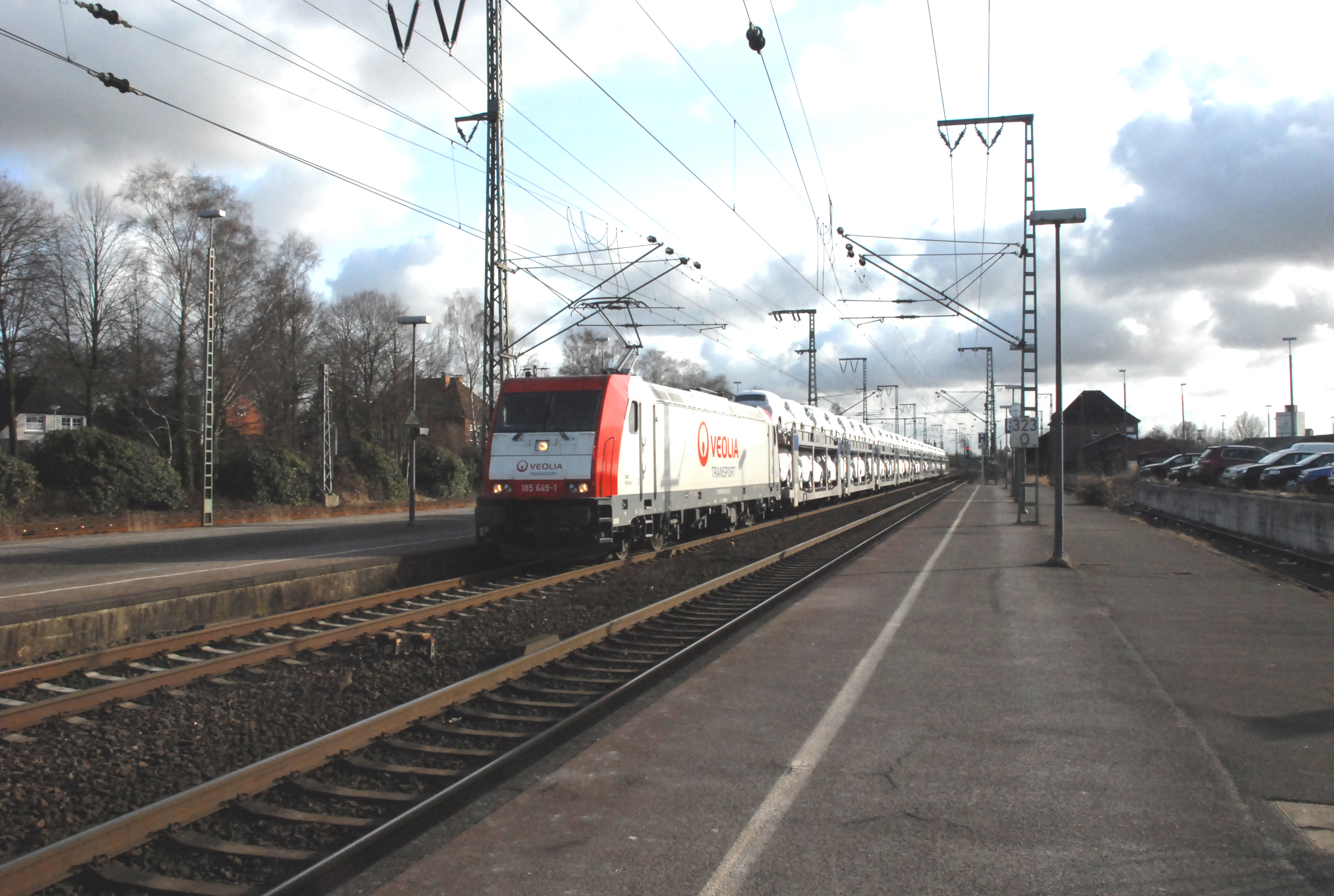 Veolia locomotief 185 649-1 van het Bombadier type Traxx op 3 maart 2010 te Leer (Ostfriesland) met trein beladen met nieuwe auto's